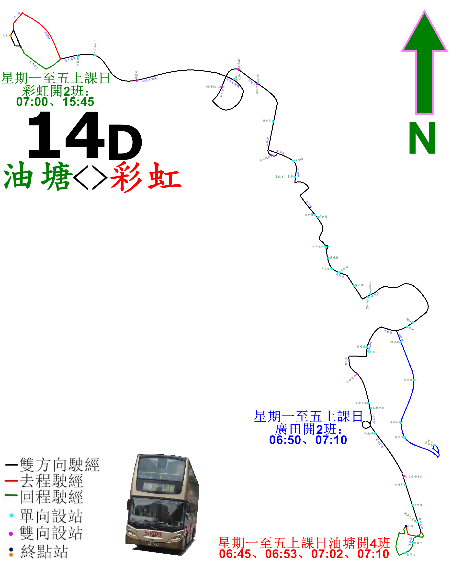 中文（香港）: 九巴14D線的走線圖